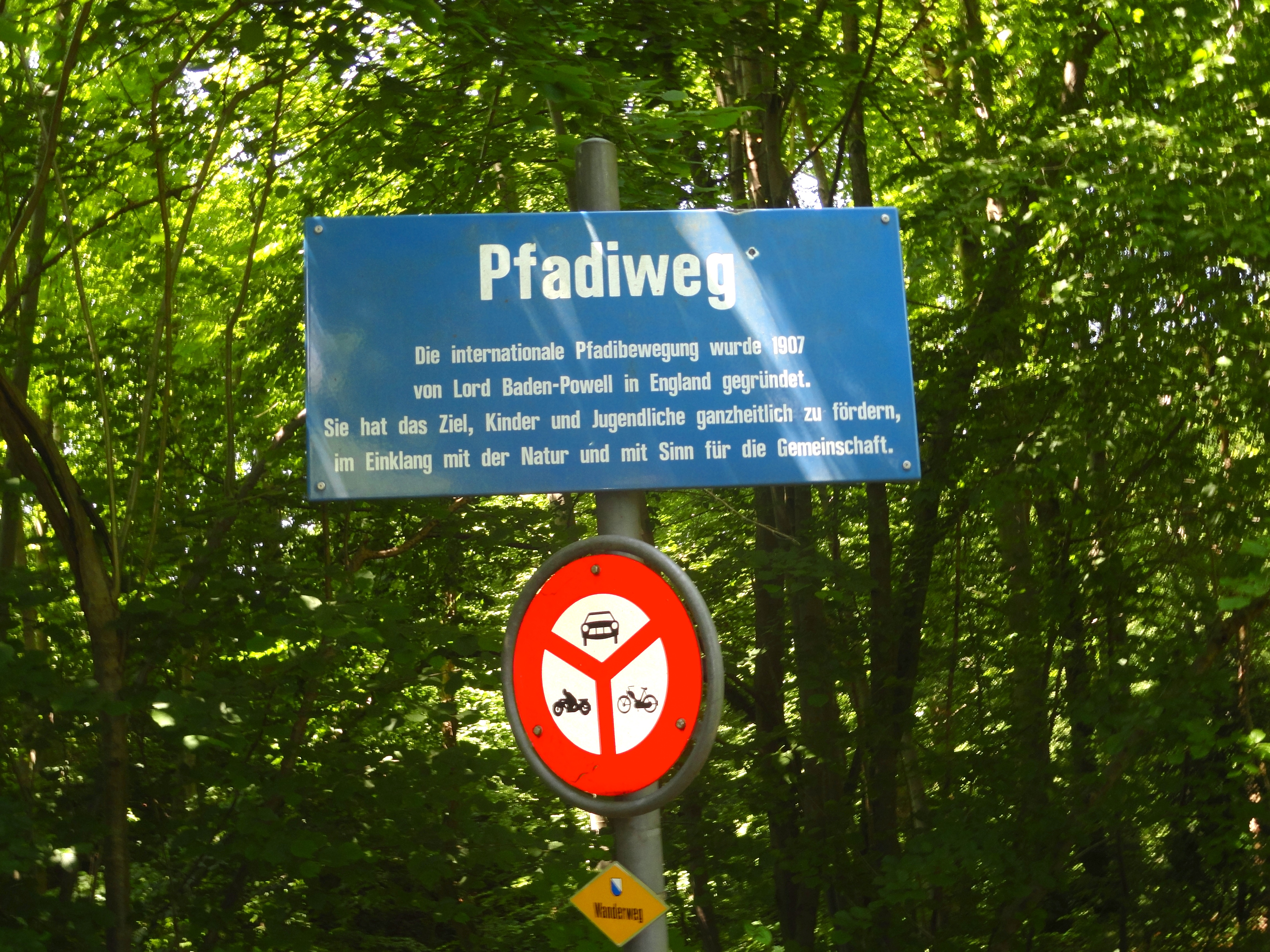 Pfadiweg im Tobel des Wehrenbach in Zürich. Pfadiweg in the Tobel of the Wehrenbach in Zurich. Text reads "Pfadiweg-Die internationale Pfadibewegung wurde 1907 von Lord Baden Powell im England gegründet. Sie hat das Ziel, Kinder und Jugendliche ganzheitlich zu fordern, im Einklang mit der Natur und mit Sinn für die Gemeinschaft." (The international Pathfinder (Scouting) movement was founded in 1907 by Lord Baden Powell in England. The goal is to encourage children and young people to be holistic, in harmony with nature and with a sense of community.)